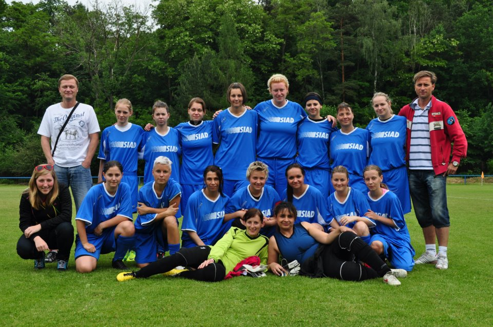 Lada Pilzova fotbal 1